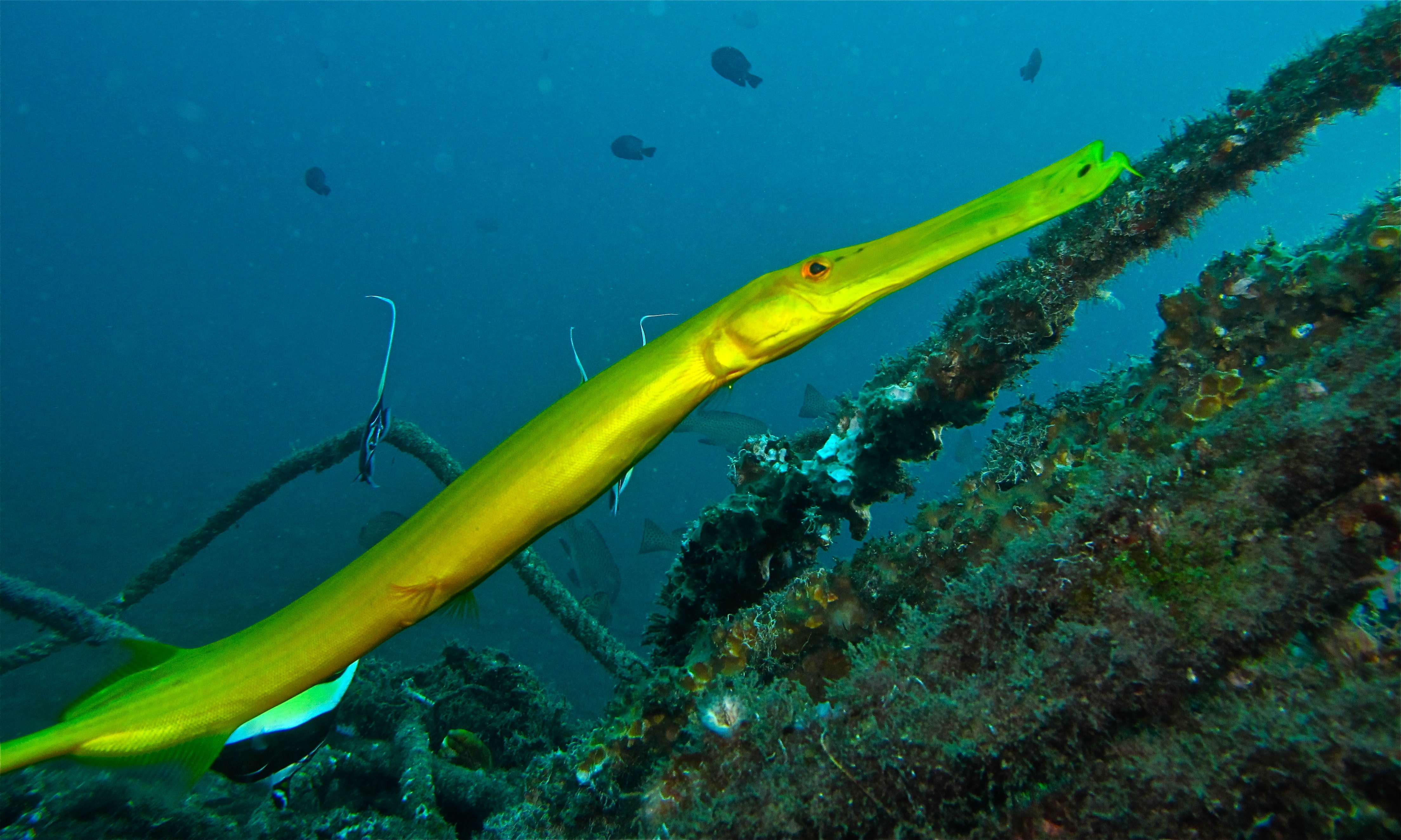 Teluk Temahu III, Lembeh Strait, Sulawesi, INDONESIA